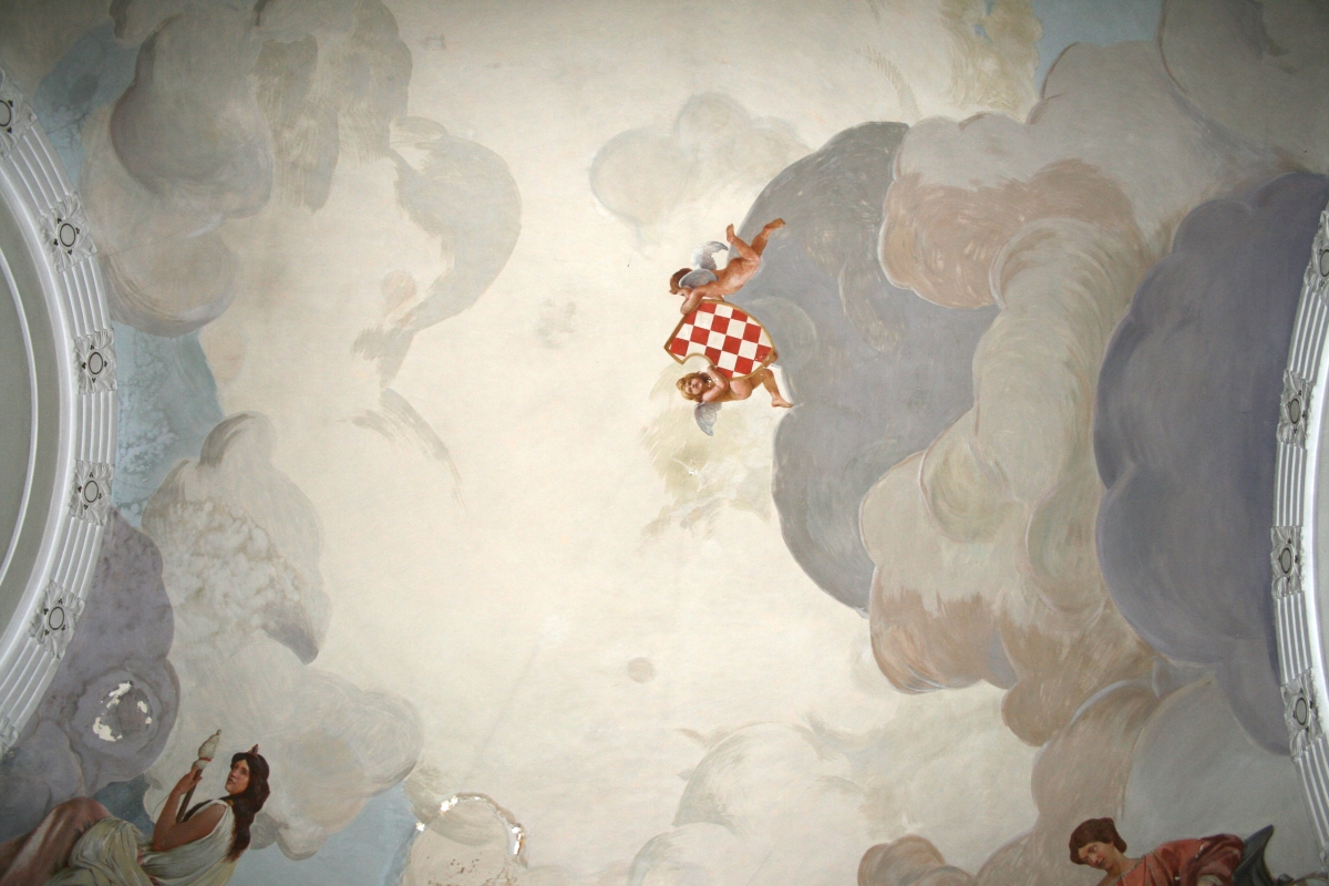 snimljeno tijekom Noći muzeja u Etnografskom muzeju u Zagrebu